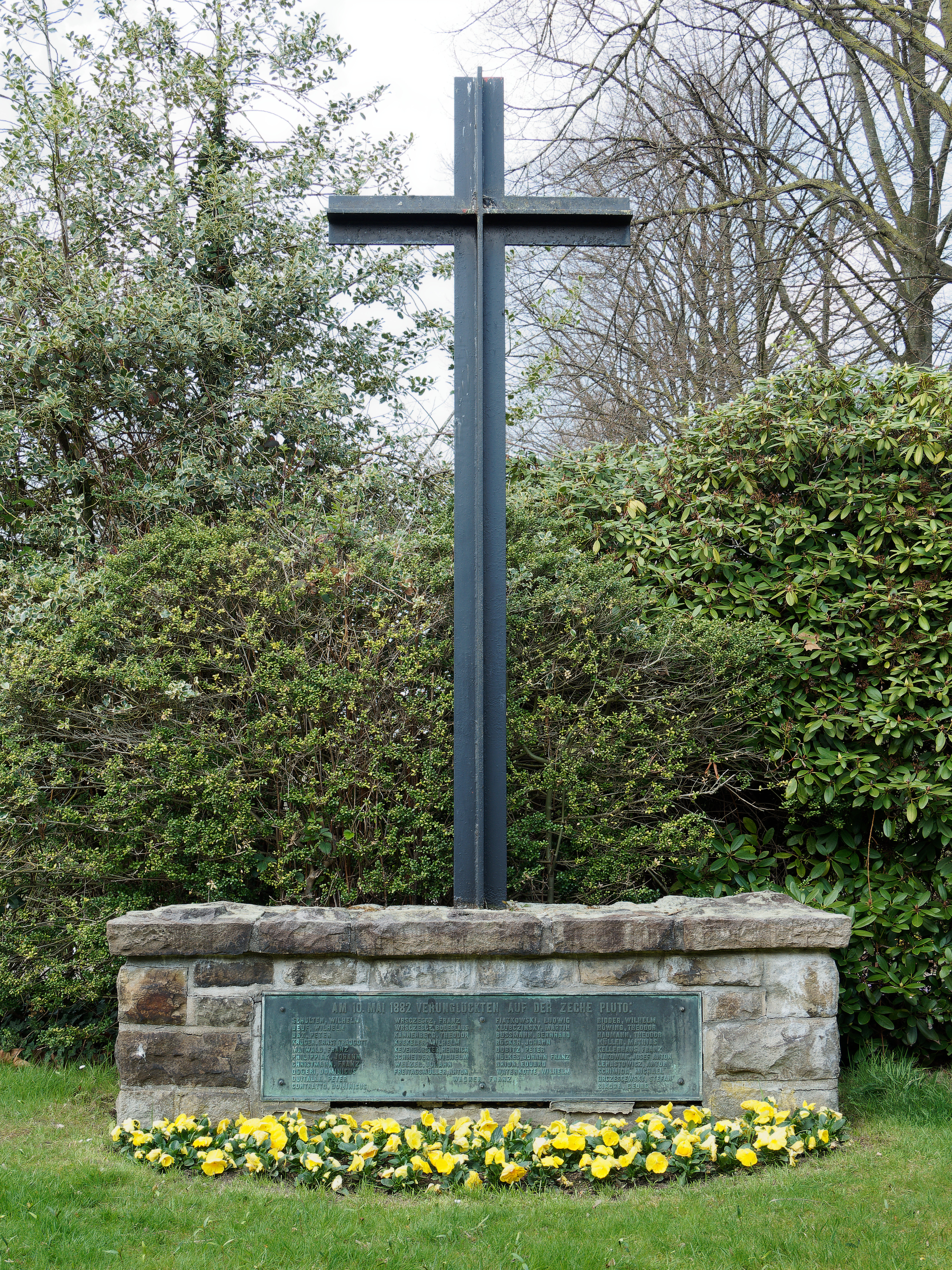 Denkmal für die in der Zeche Pluto in Herne-Wanne-Eickel 1882 verunglückten 37 Bergleute auf dem Friedhof an der Herzogstraße im Stadtteil Eickel.